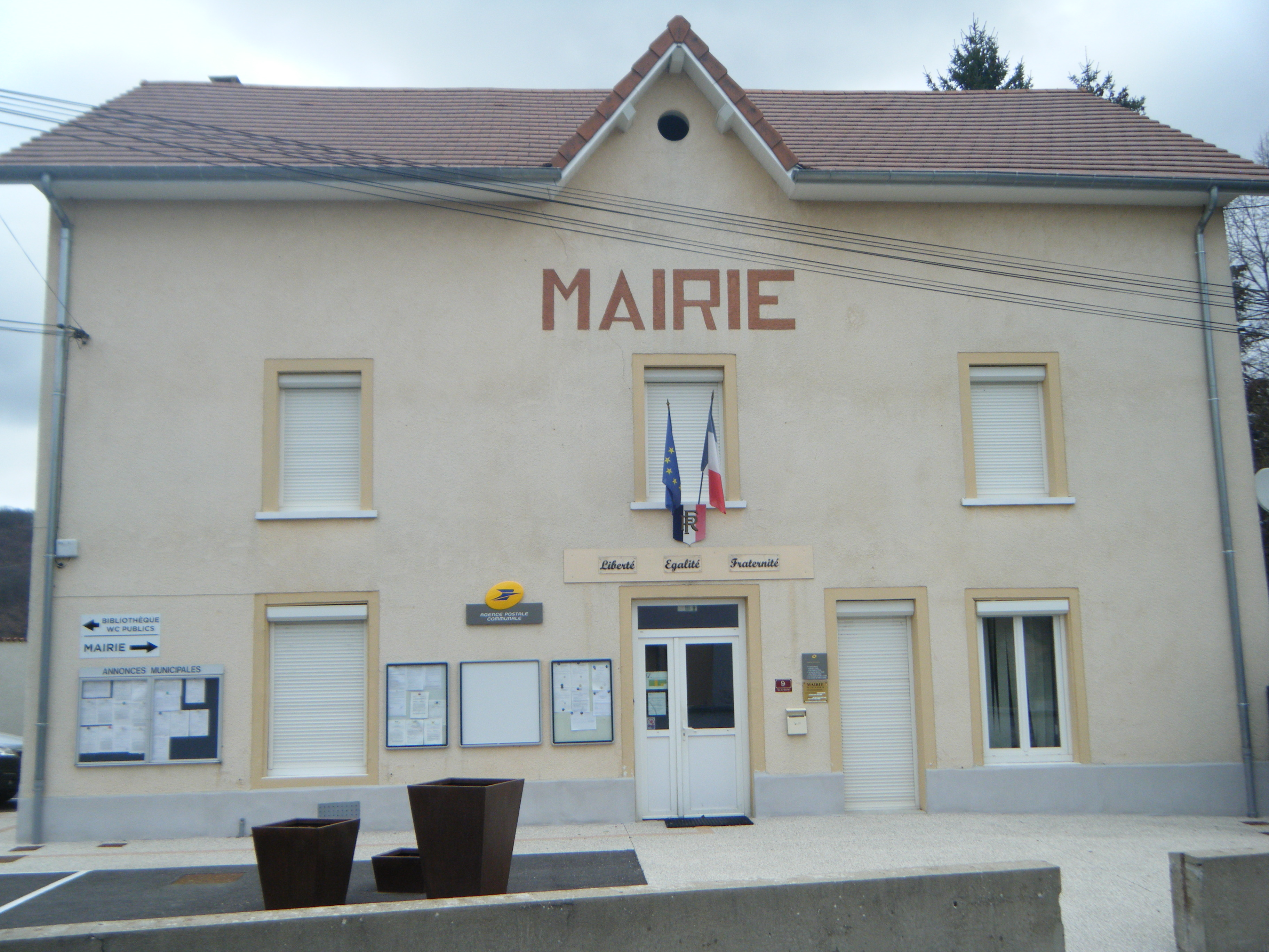 mairie de Chabons en 2019